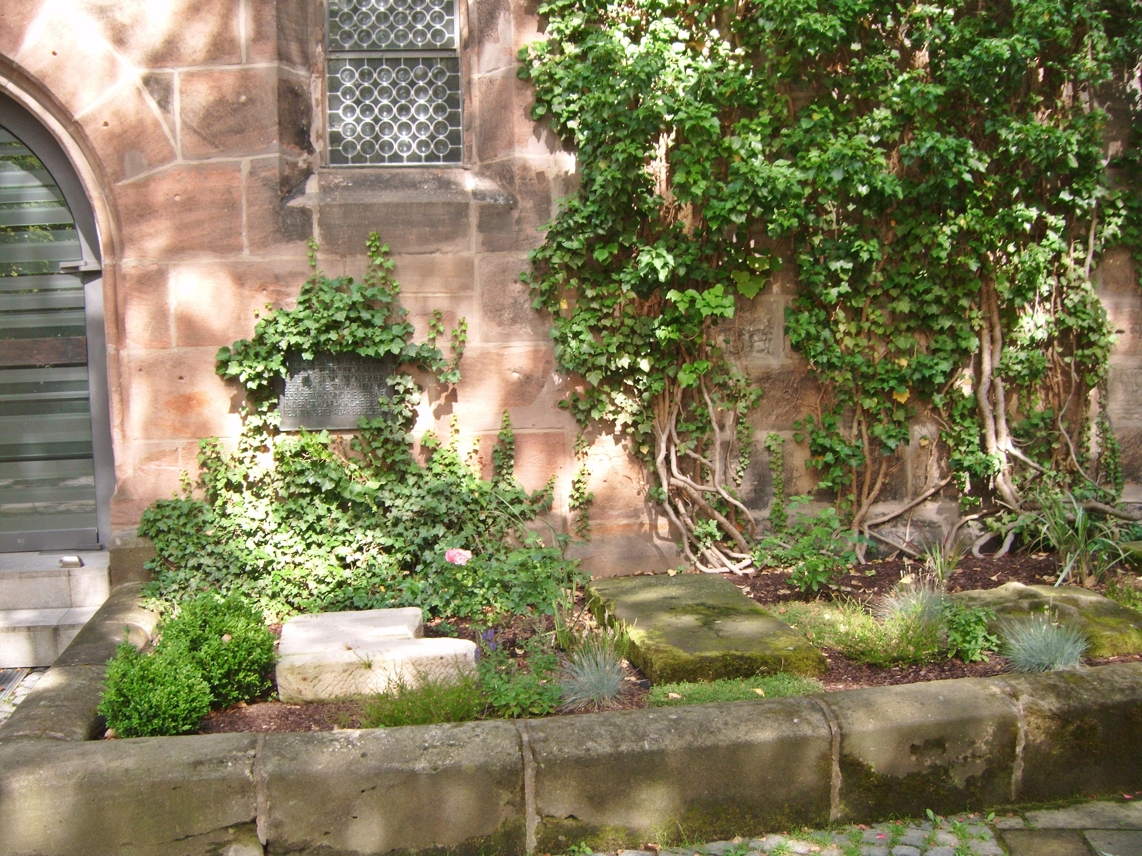 St. Klara Nürnberg, Nonnenfriedhof hinter der Kirche, ganz links das Grab der Äbtissin Caritas Pirckheimer (mit Tafel)